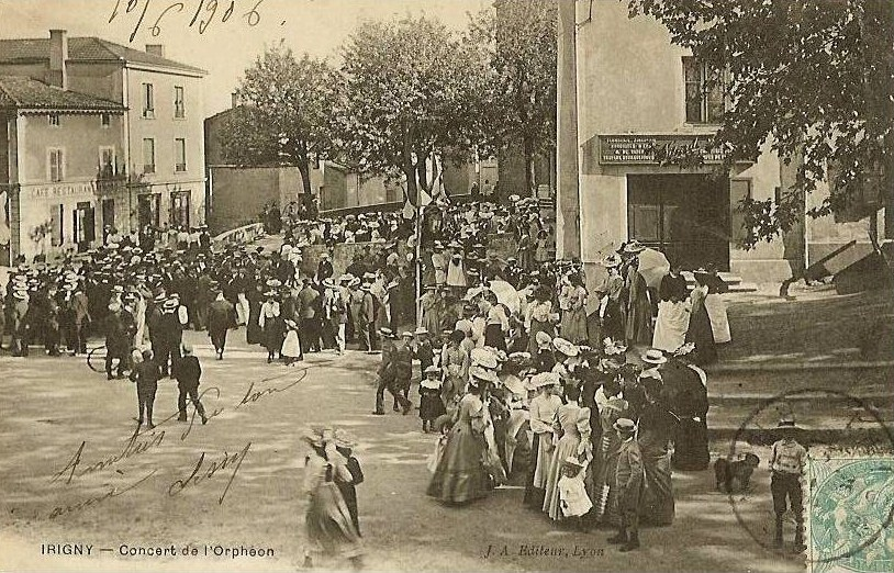 Concert de l'Orphéon à Irigny vers 1906 (la carte a été posté le 10 juin 1906).